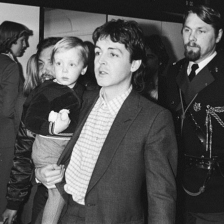 Paul McCartney arriveert op Schiphol in 1980. Op zijn arm zit zijn zoon James McCartney